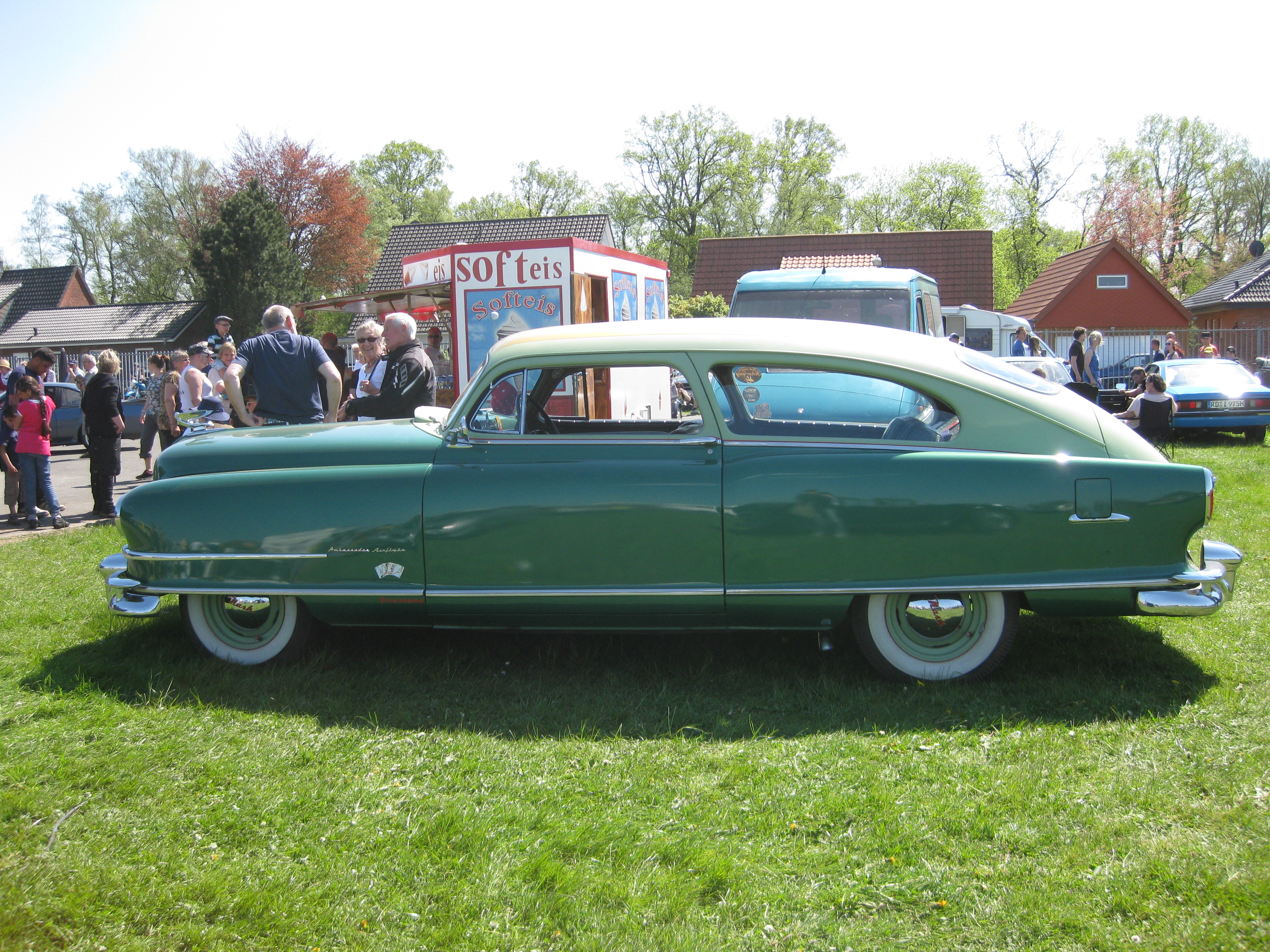 Nash Ambassador Airflyte Seitenansicht